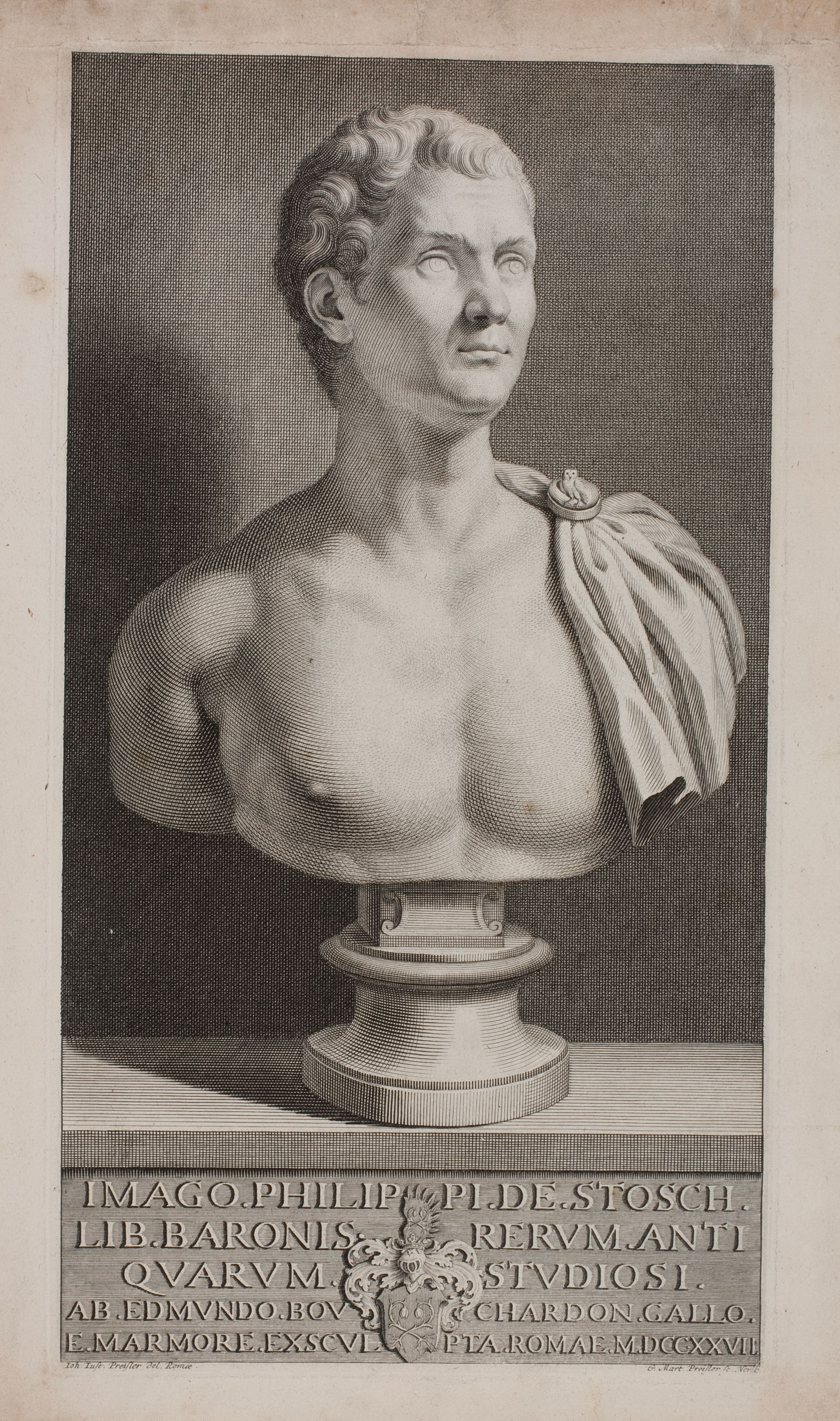 Bildnis Philipp von Stosch, Kupferstich, 33.0 x 18.1 cm (Platte); Wolfenbüttel, Herzog August Bibliothek, Inventar-Nr. A 21235